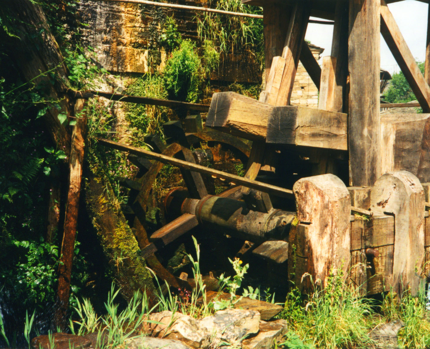 Taramundi (Asturias, España), conjunto etnográfico de Os Teixois. El batán; fotografía en papel. Taramundi (Asturias, Spain), Os Teixois ethnographic site, El Batán. Paper photograph.